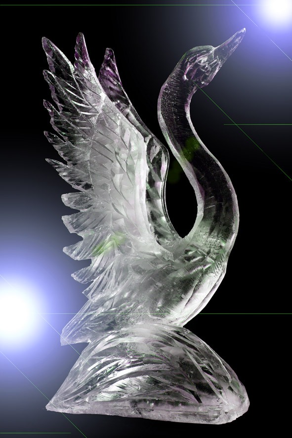 透明な純氷は氷彫刻が映える